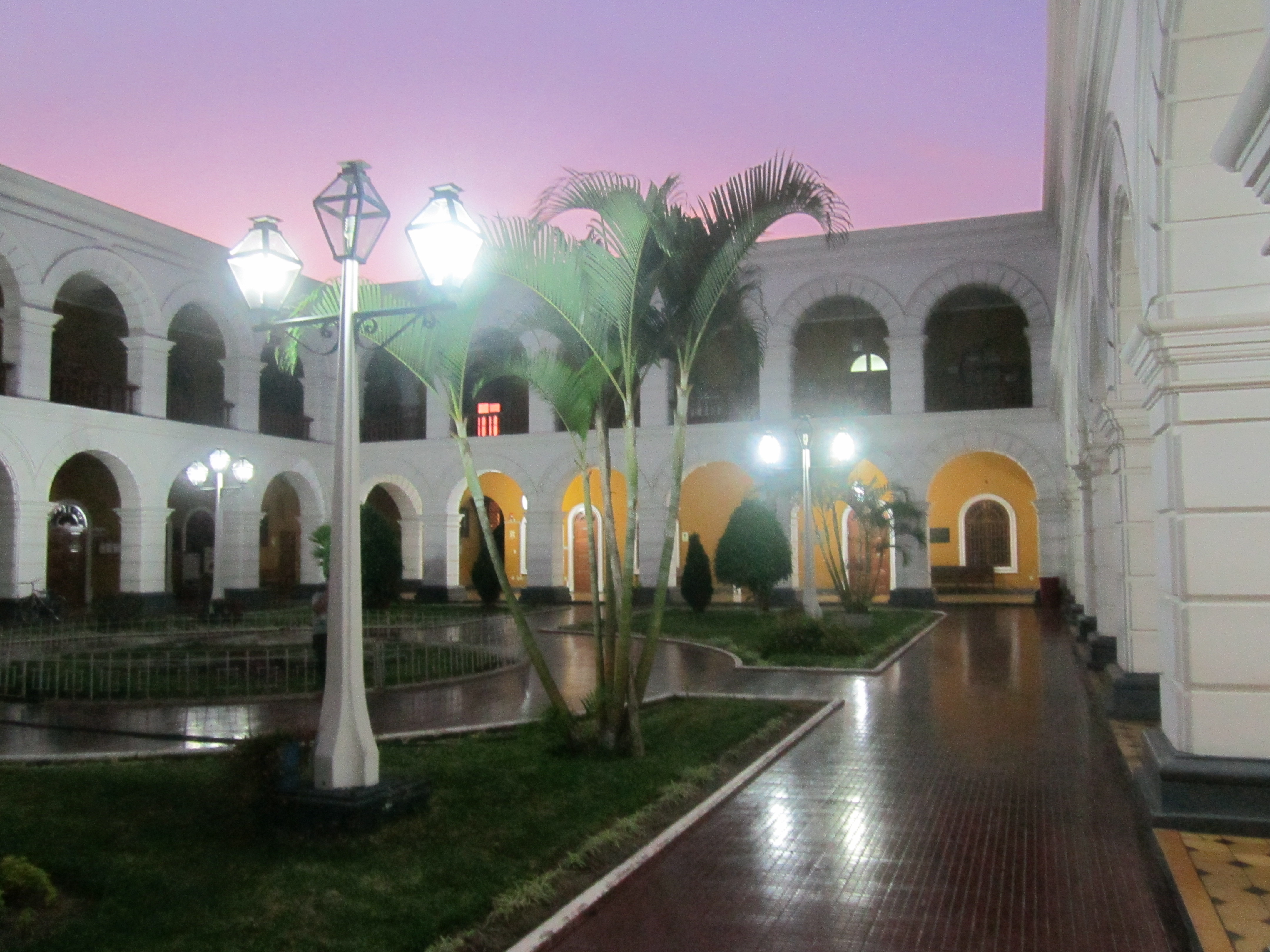 Atardecer en patio de la Corte Superior de Justicia de La Libertad.